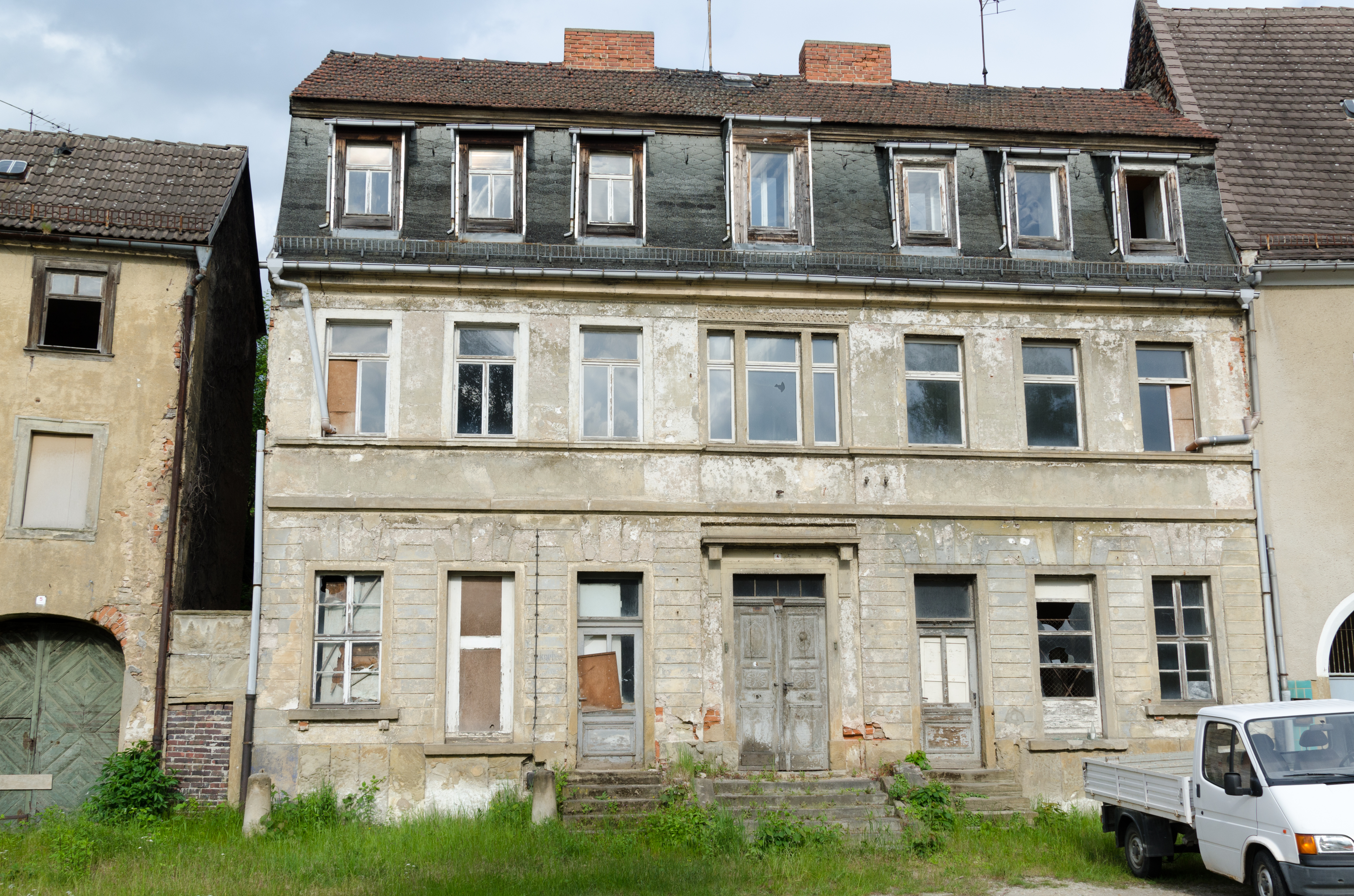 Zeitz, Brühl 4